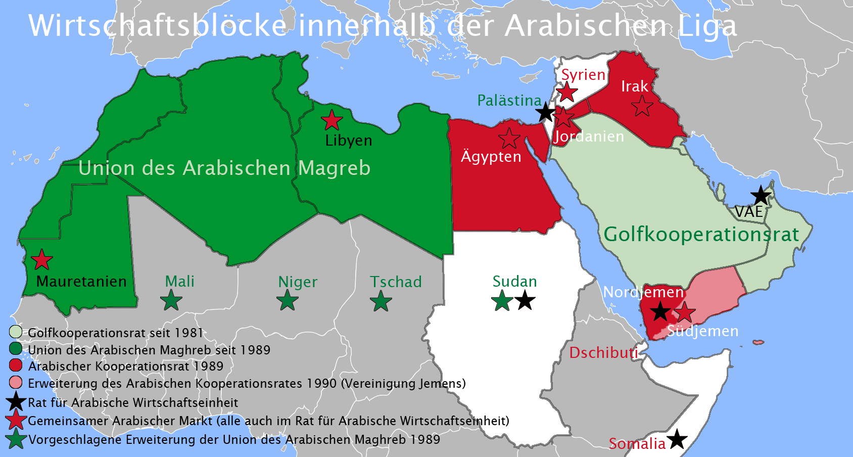 Wirtschaftsblöcke innerhalb der Arabischen Liga: Arabischer Kooperationsrat (rot) zwischen dem Golfkooperationsrat (hellgrün) und der Union des Arabischen Maghreb (dunkelgrün) / Erweiterung des Arabischen Kooperationsrates (1990 Südjemen), ACC-Beitrittskandidaten (rote Schrift), vorgeschlagene Erweiterung der Maghreb-Union (grüne Sterne), Rat für Arabische Wirtschaftseinheit (schwarze Sterne) und Gemeinsamer Arabischer Markt (rote Sterne)